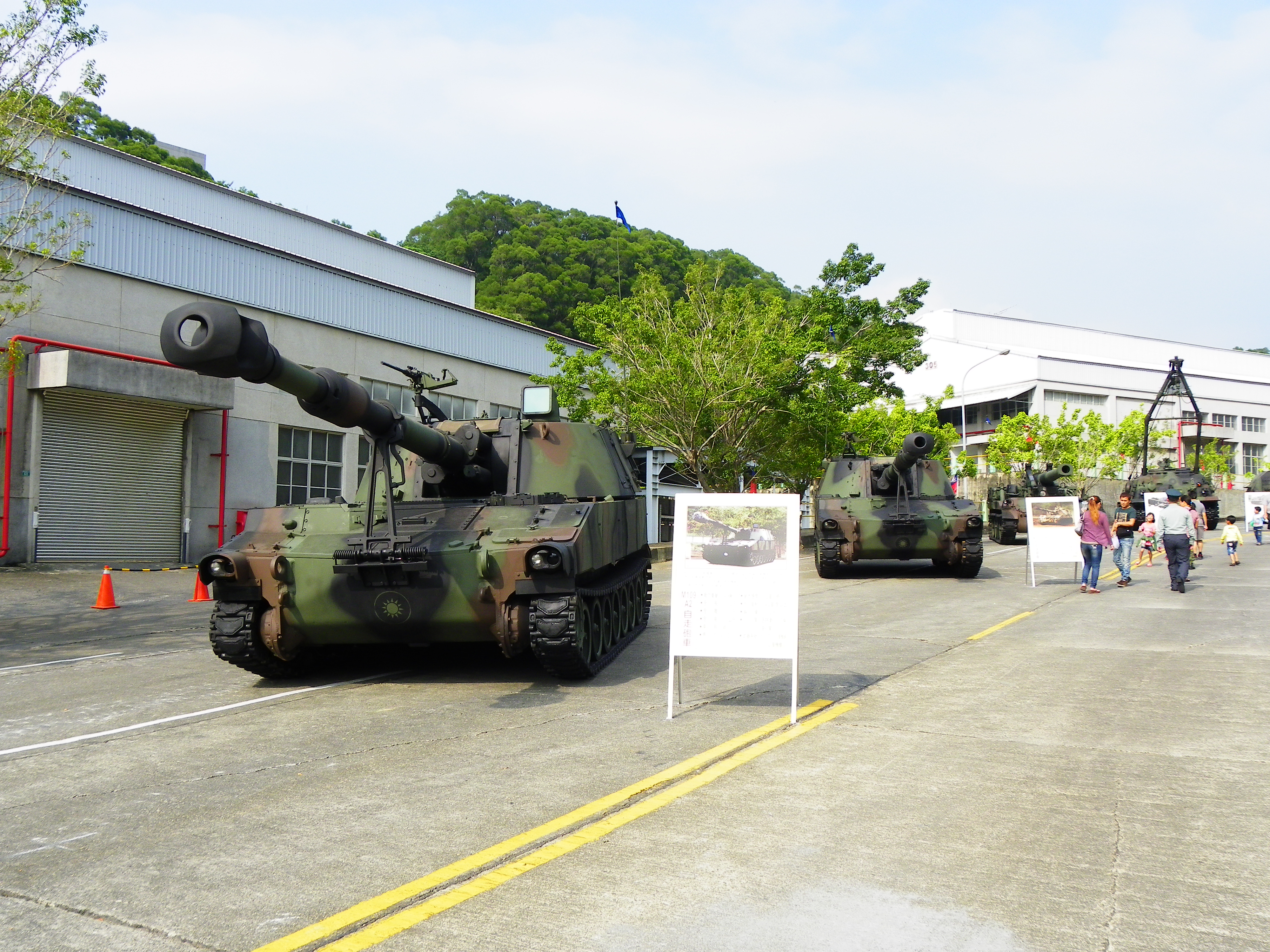 2012年兵整中心營區開放活動，岳岡路展示之中華民國陸軍各式自走榴彈砲，前起：M109A2、M109A5、M110A2，遠方是M88A1裝甲救濟車。